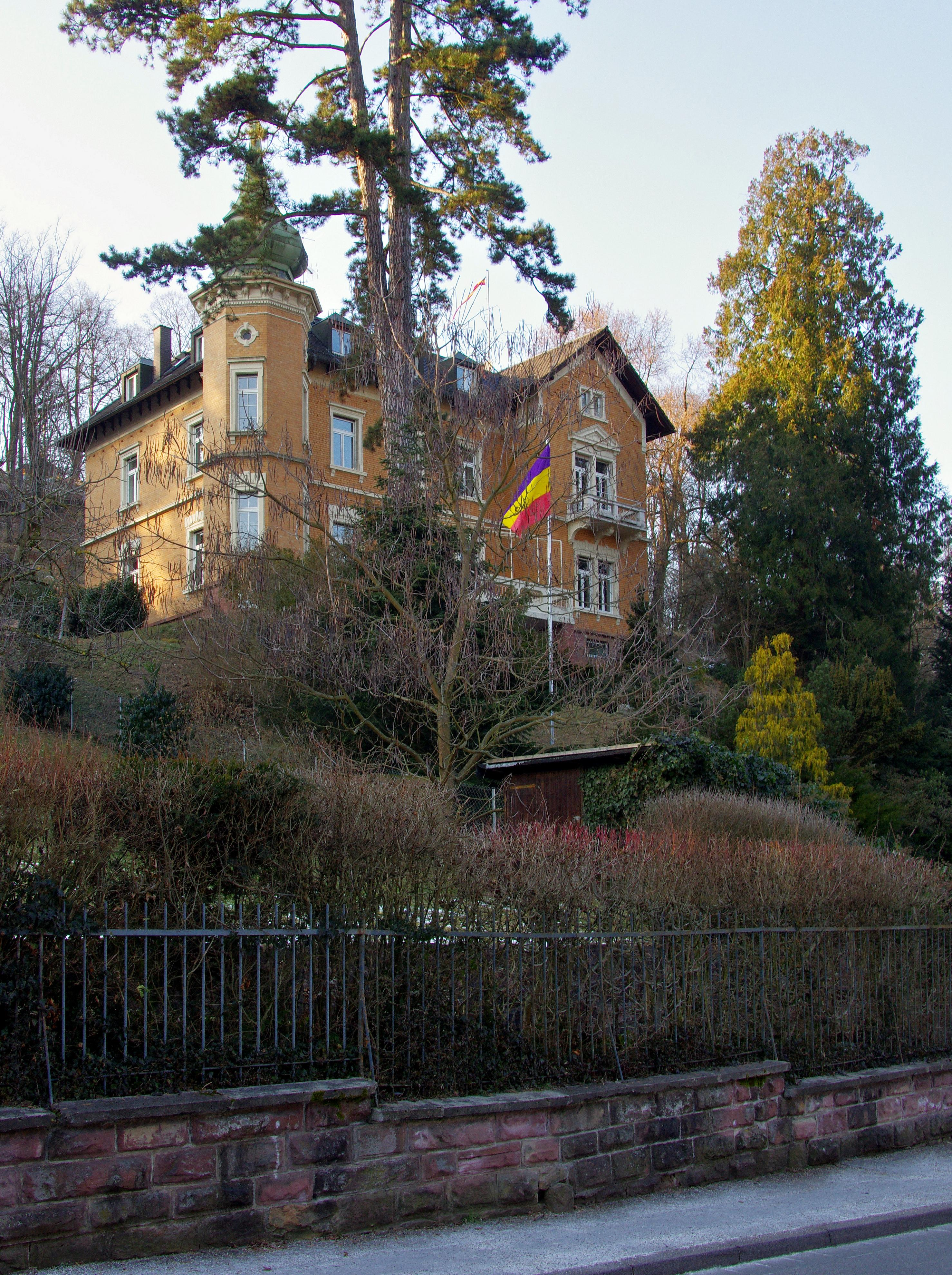 K.D.St.V. Hercynia Mercystr. 16 79100 Freiburg